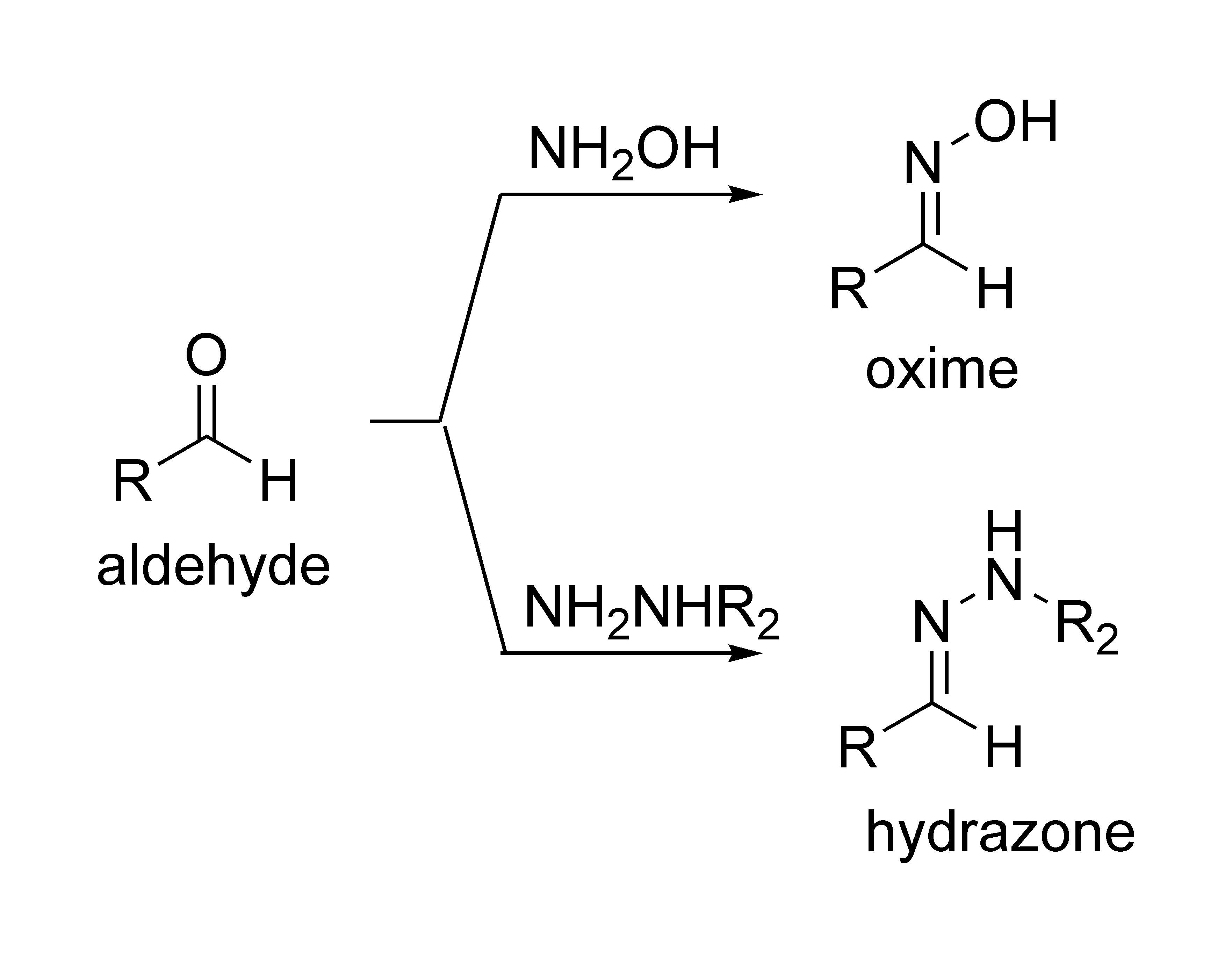 肟和腙